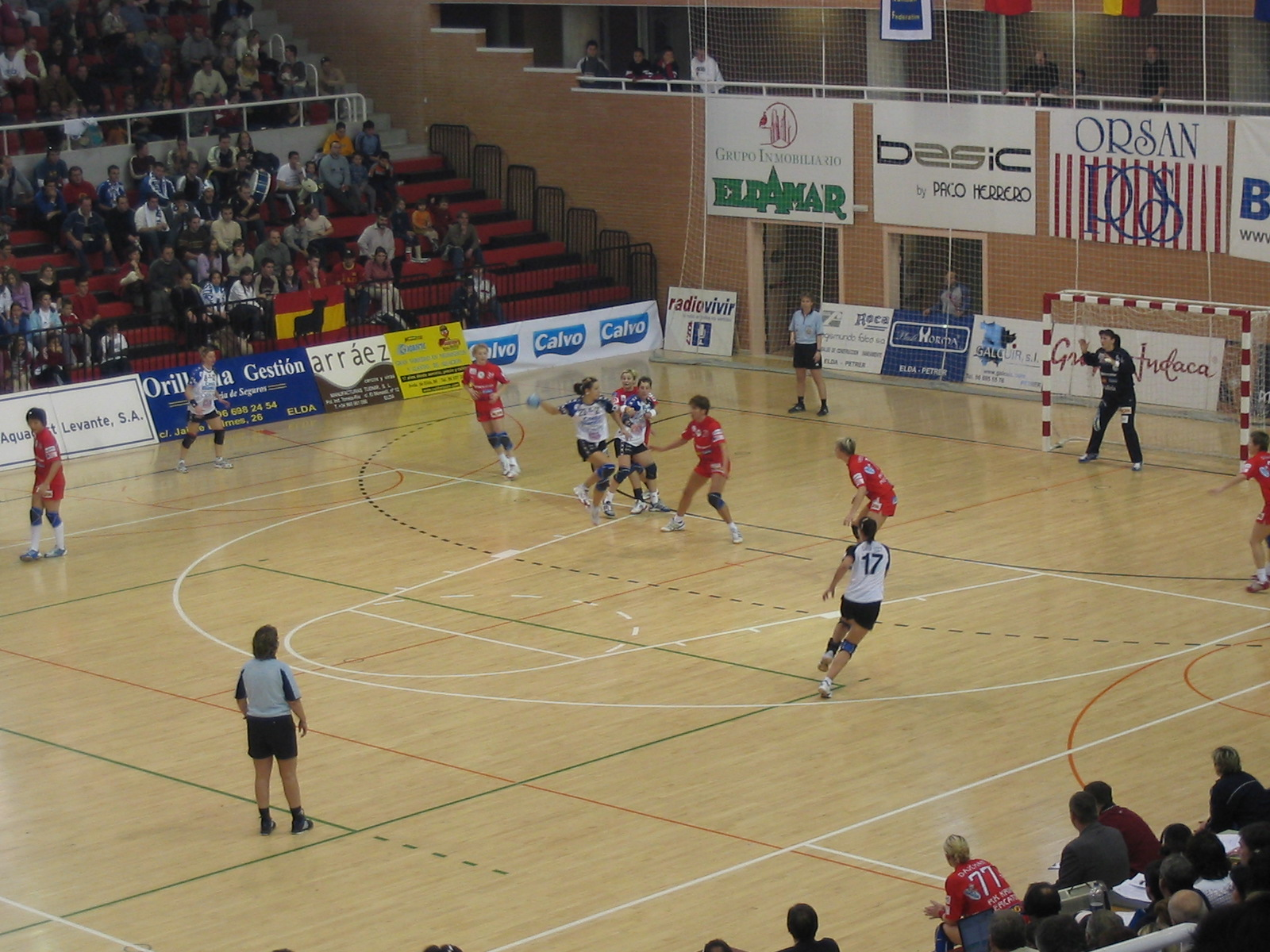 Fotografía realizada durante el partido que enfrentaba al Orsan Elda Prestigio contra el Krim.